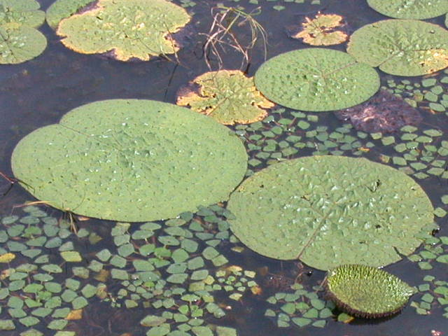 オニバスの葉 2004年8月25日撮影。1600*1200ピクセルの画像を640*480でトリミング。 右下には水面に出たばかりで広がる前の葉が見える。この円形葉はあまり大きくない。